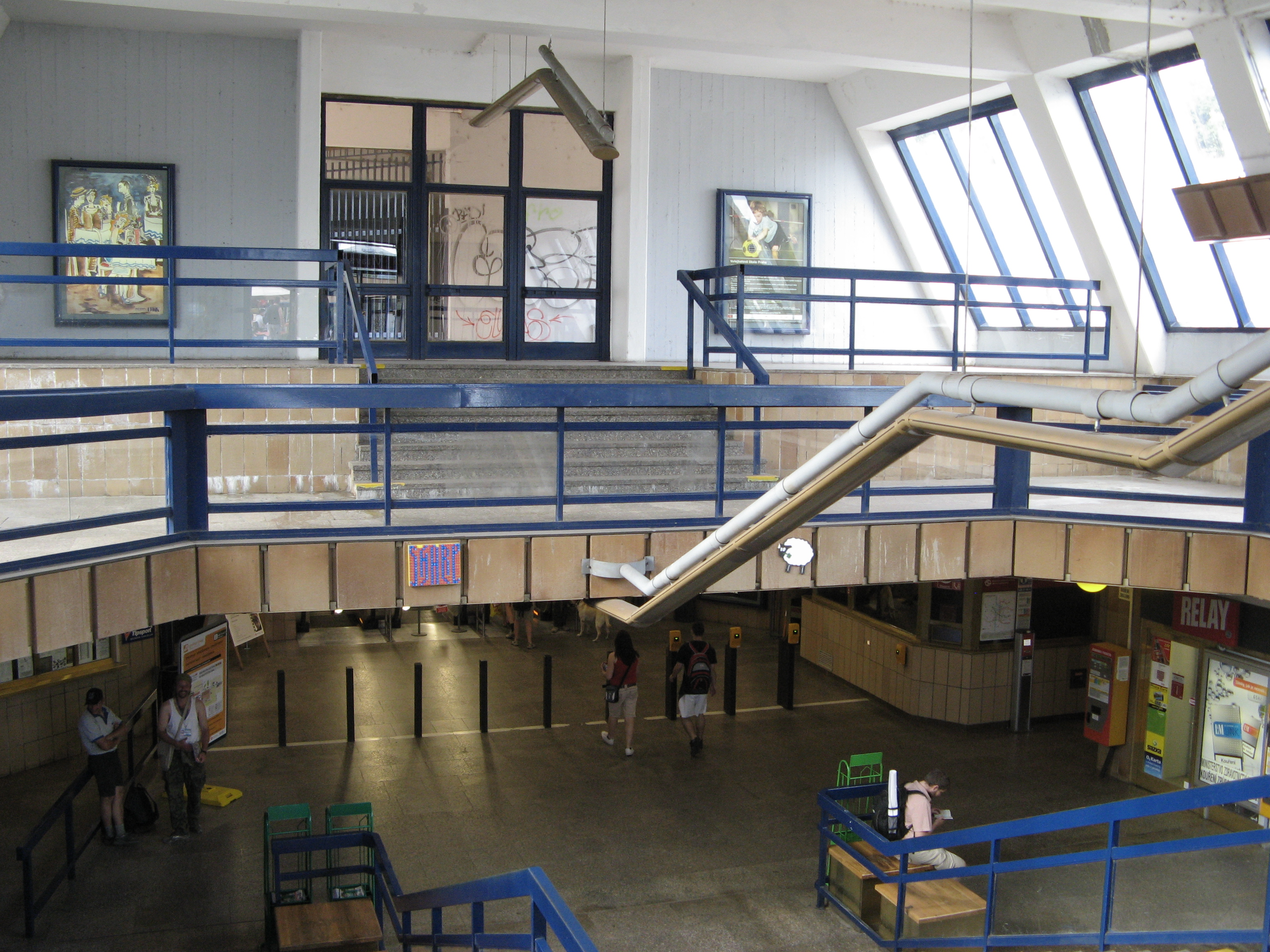 Česky: Interiér vestibulu stanice Vltavská na trase C.